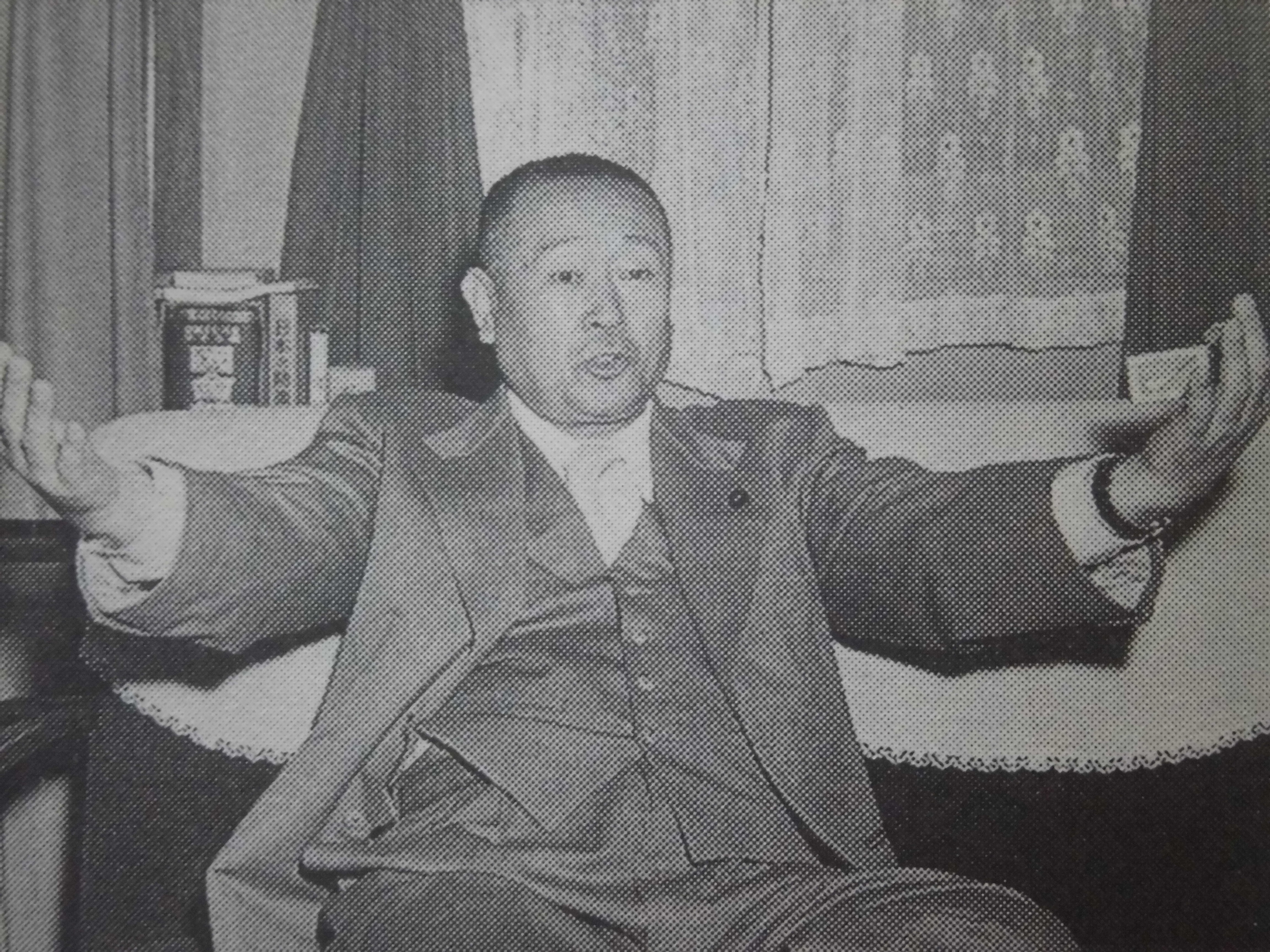 堤康次郎（Tsutsumi Yasuzirou3）